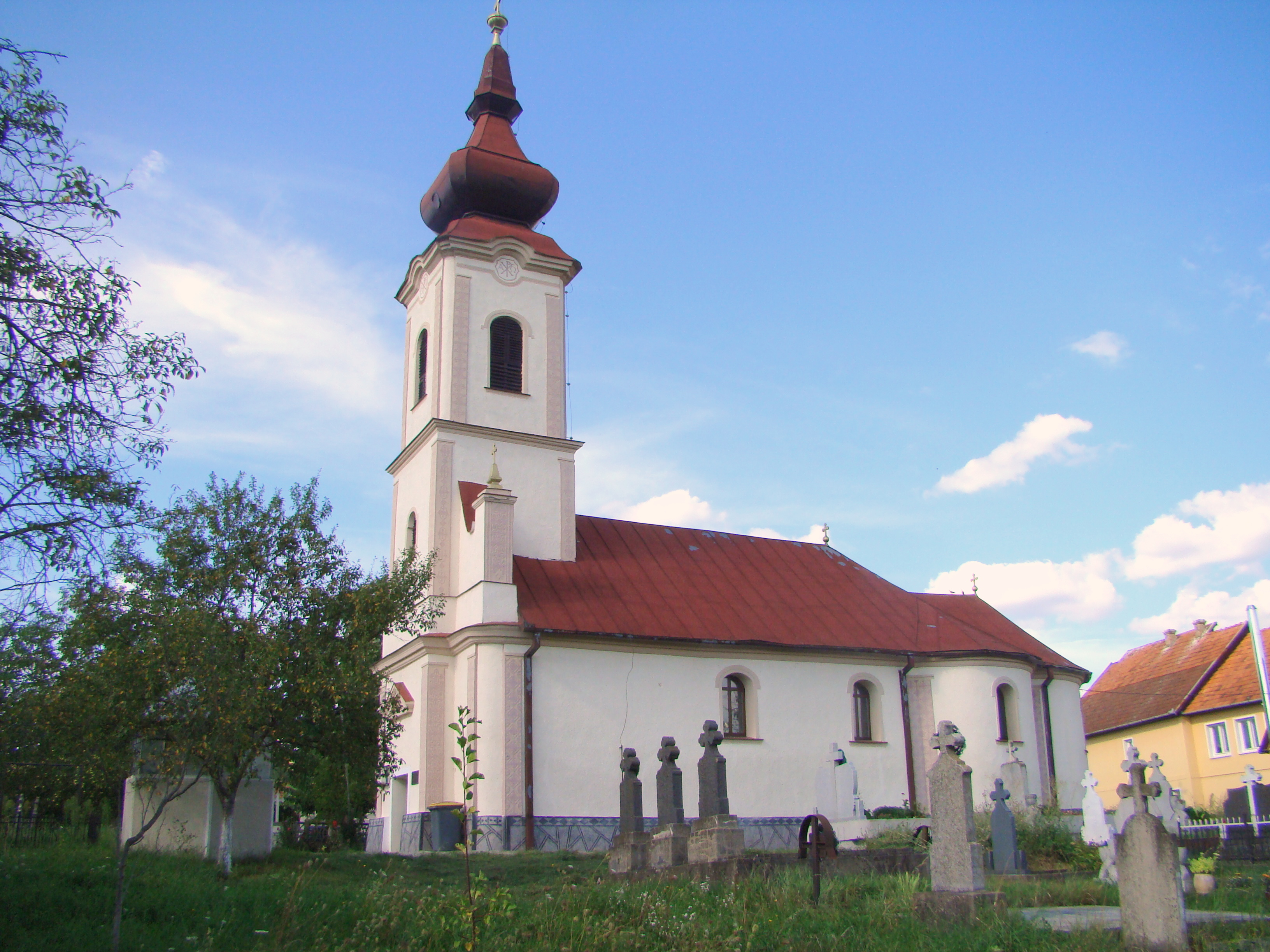 Biserica ortodoxă „Sf. Dumitru”, localitate componentă TINĂUD; oraș Aleșd